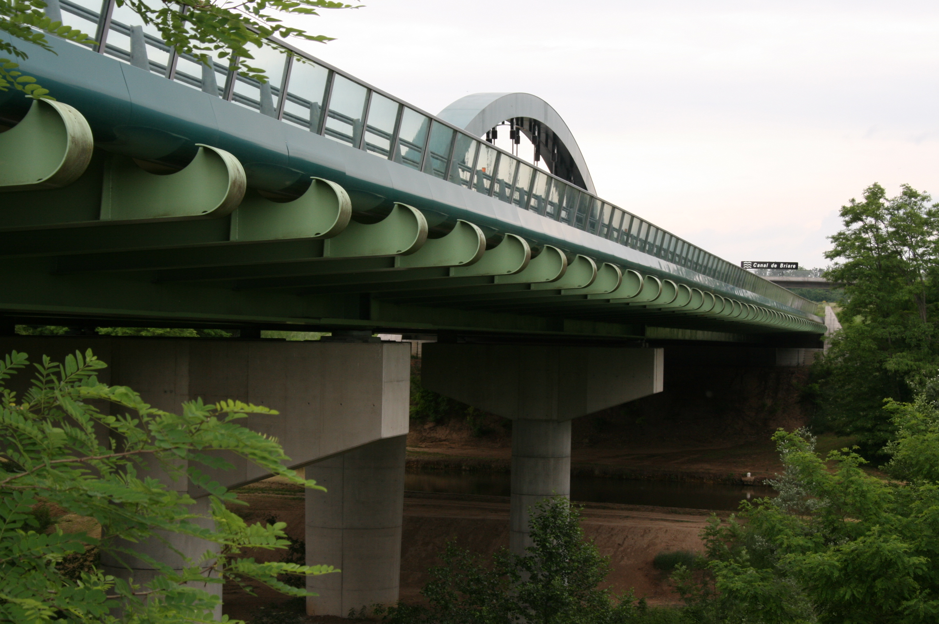 Viaduc de Briare - Pont Bowstring supportant l'autoroute A77 et franchissant le Canal de Briare et la Trézée - département du Loiret - France